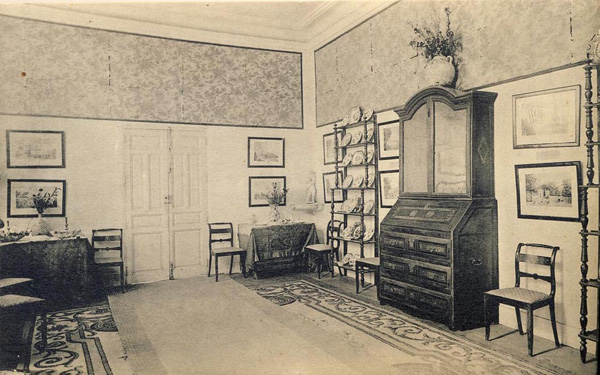 Vista del comedor del Museo Romántico en 1924.